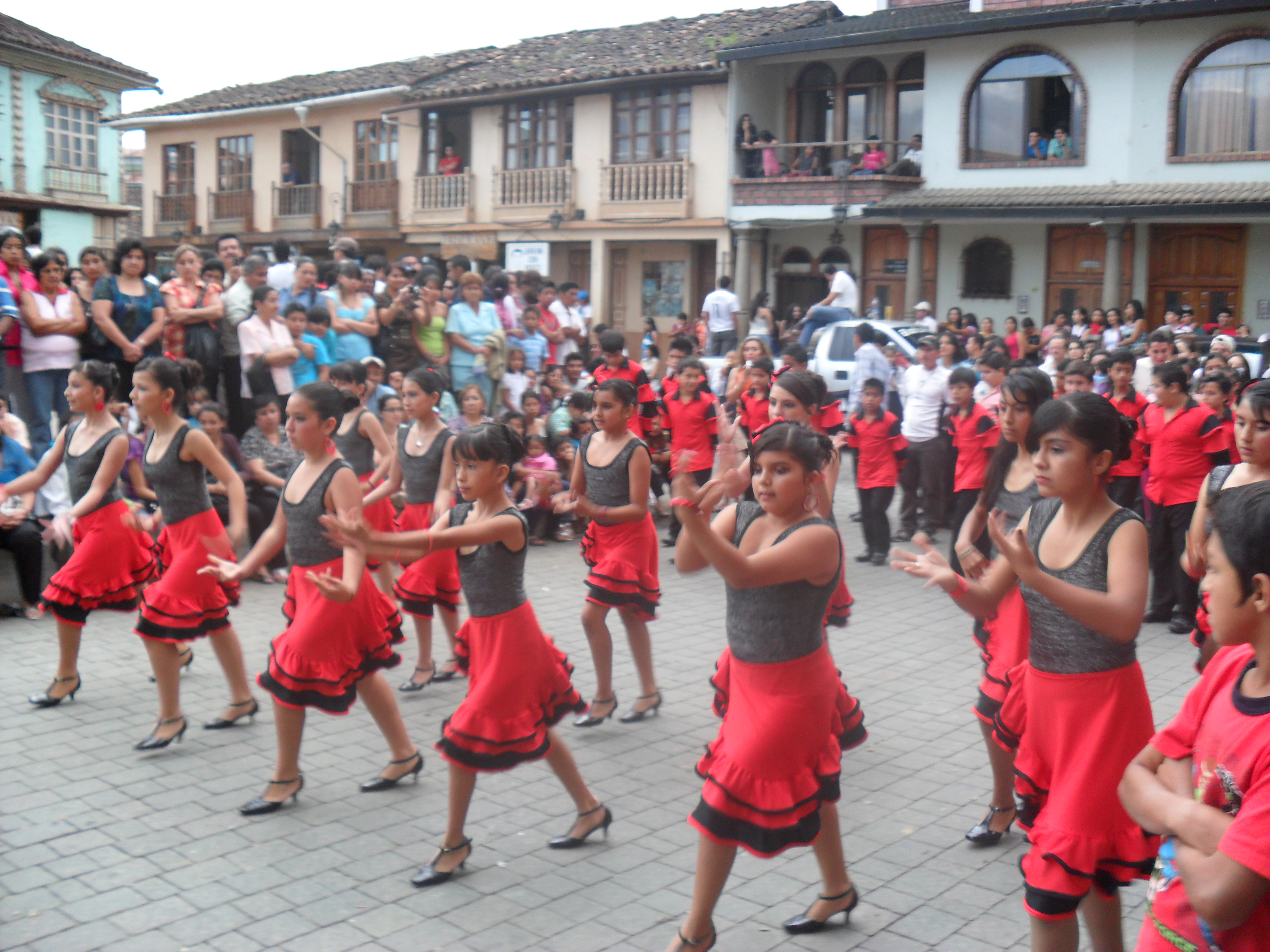 Cosplay por los 10 años de Naruto